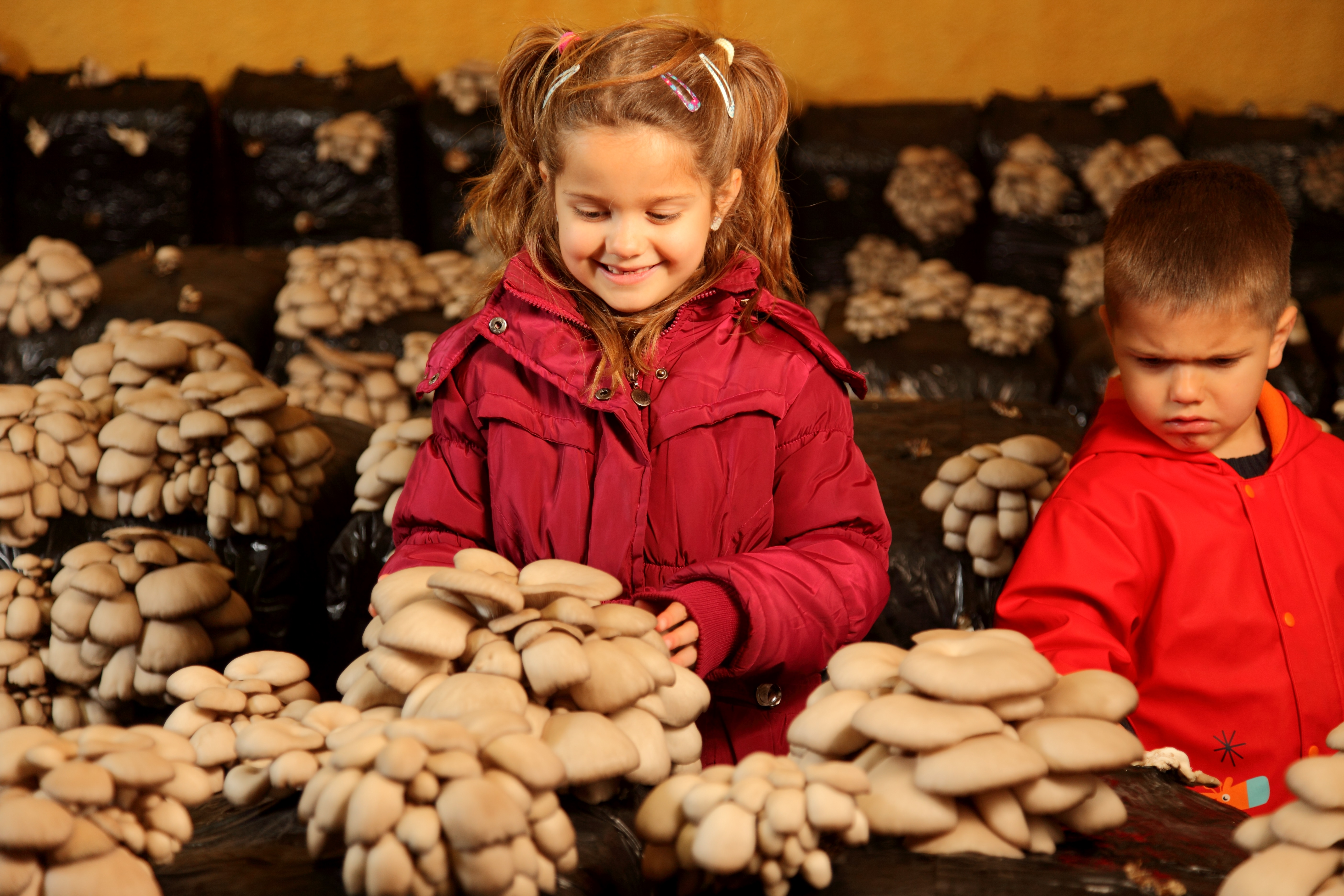 Cultivo de setas de ostra (Pleurotus ostreatus) en Pradejón, localidad líder en producción de hongos en España.